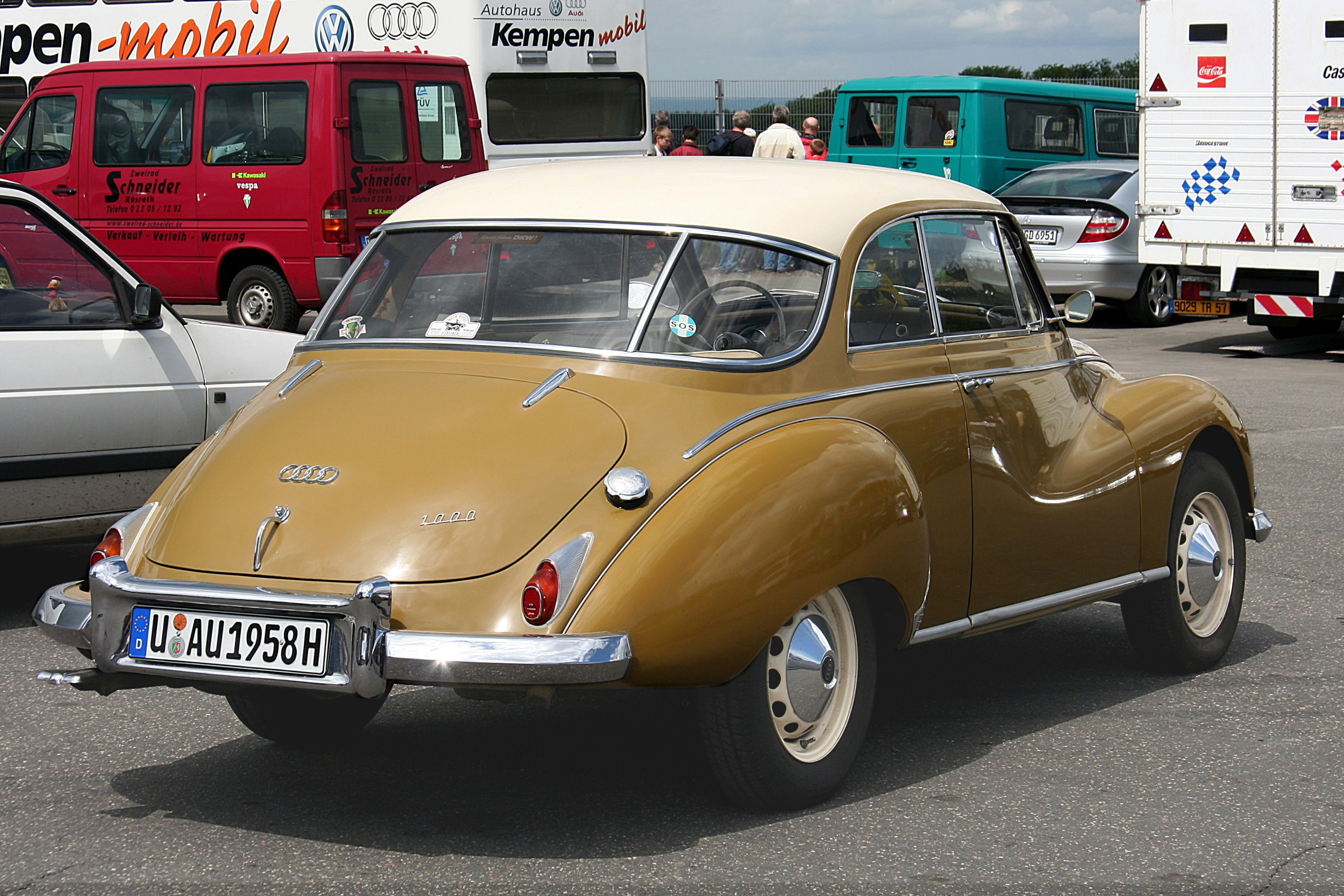 Auto Union 1000, Baujahr 1958, im Fahrerlager des Nürburgrings